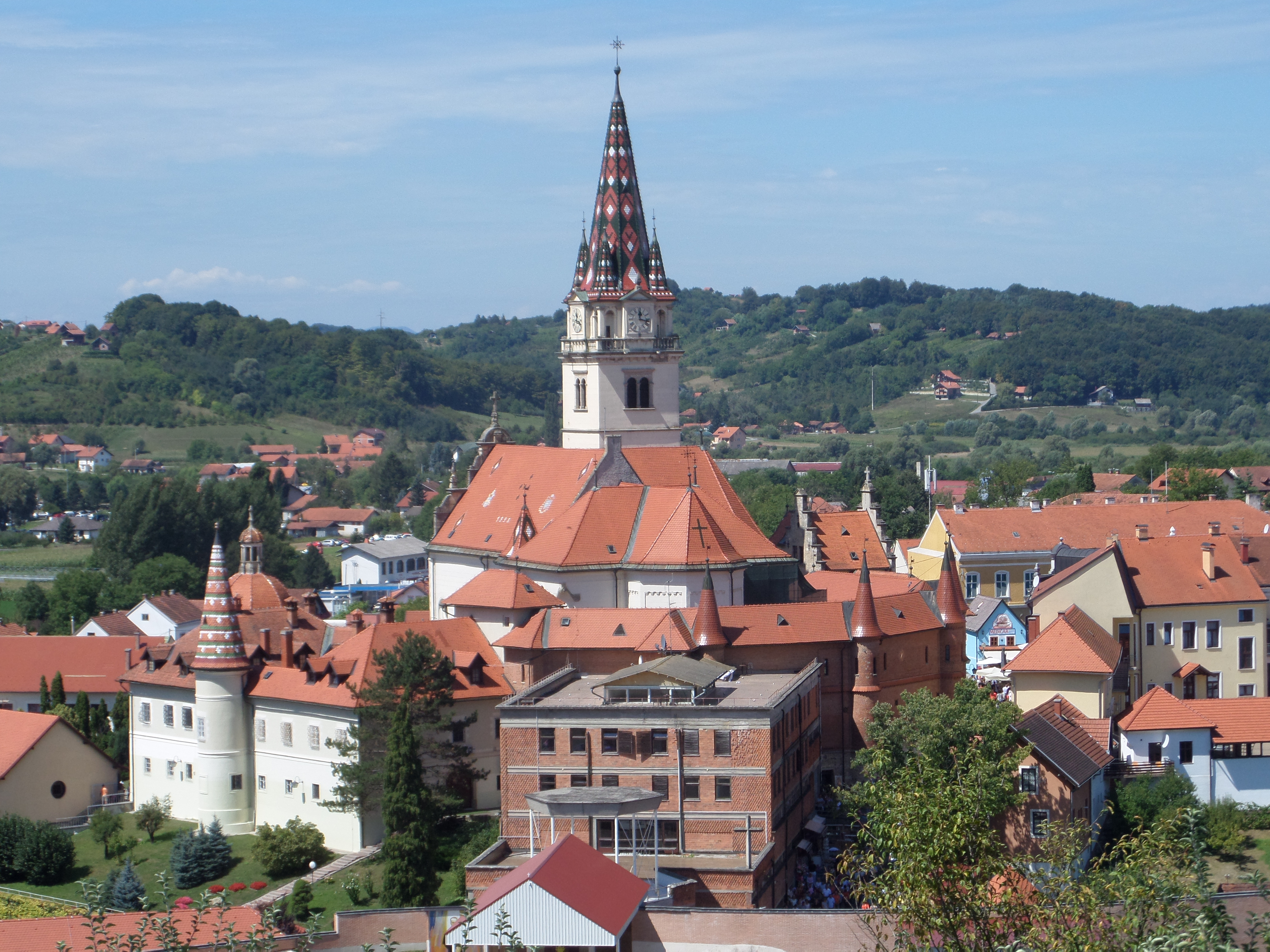 15.08.2016. - 49246, Marija Bistrica, Kroatien